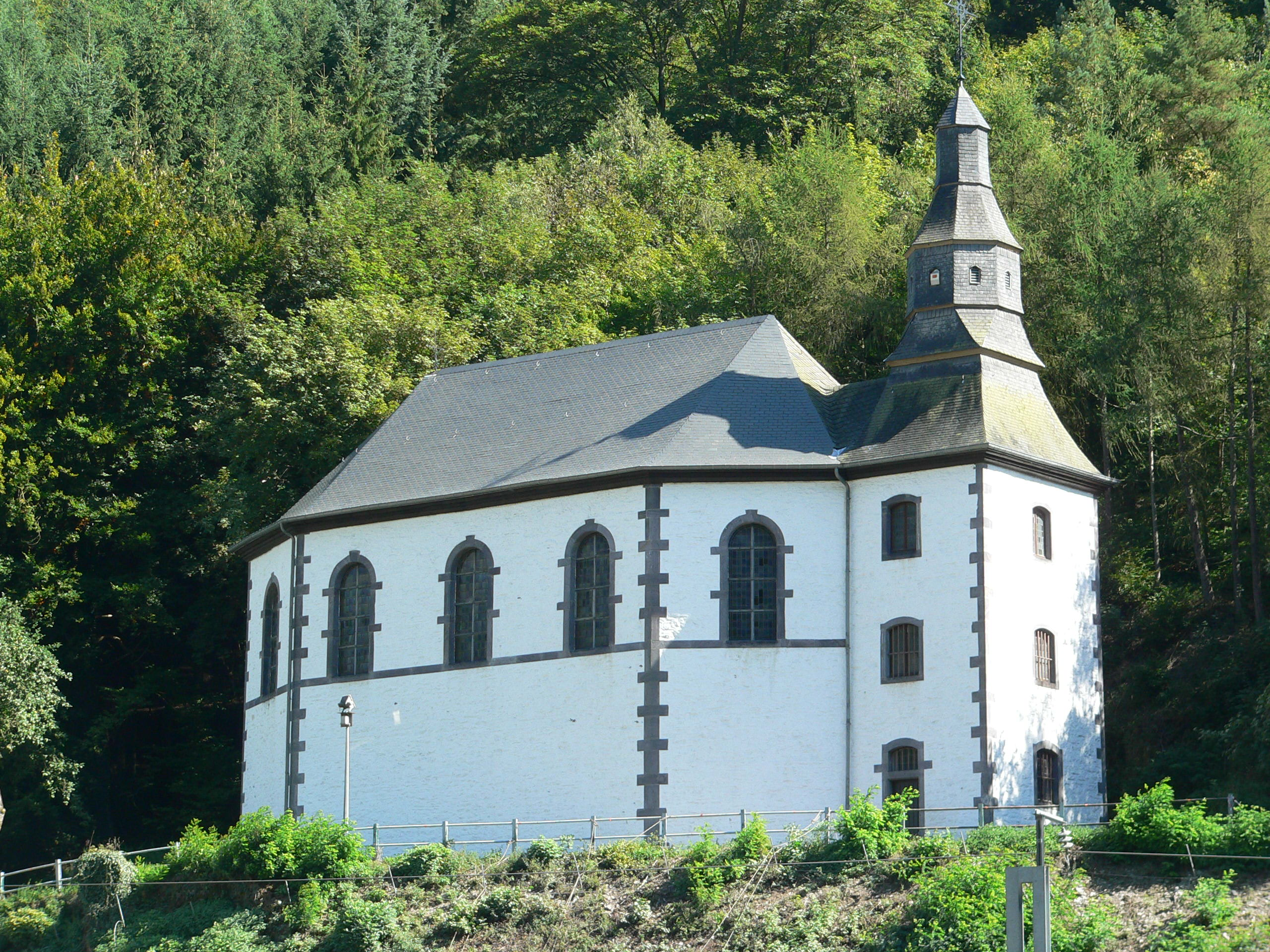 Loretto-Kapelle in Clerf (fr.: Clervaux) Luxemburg